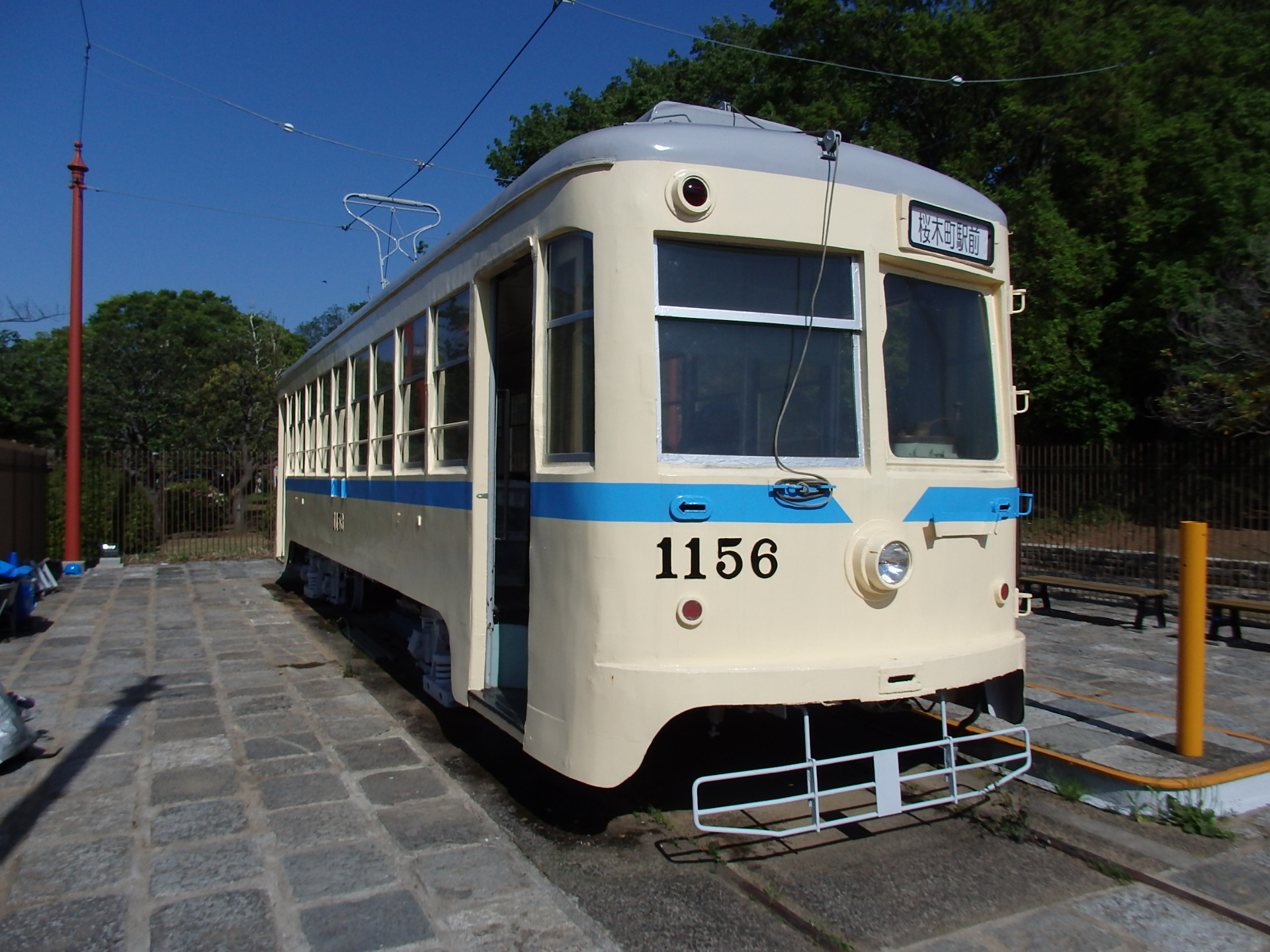 横浜市磯子区の久良岐公園に保存されている横浜市電1156号車。